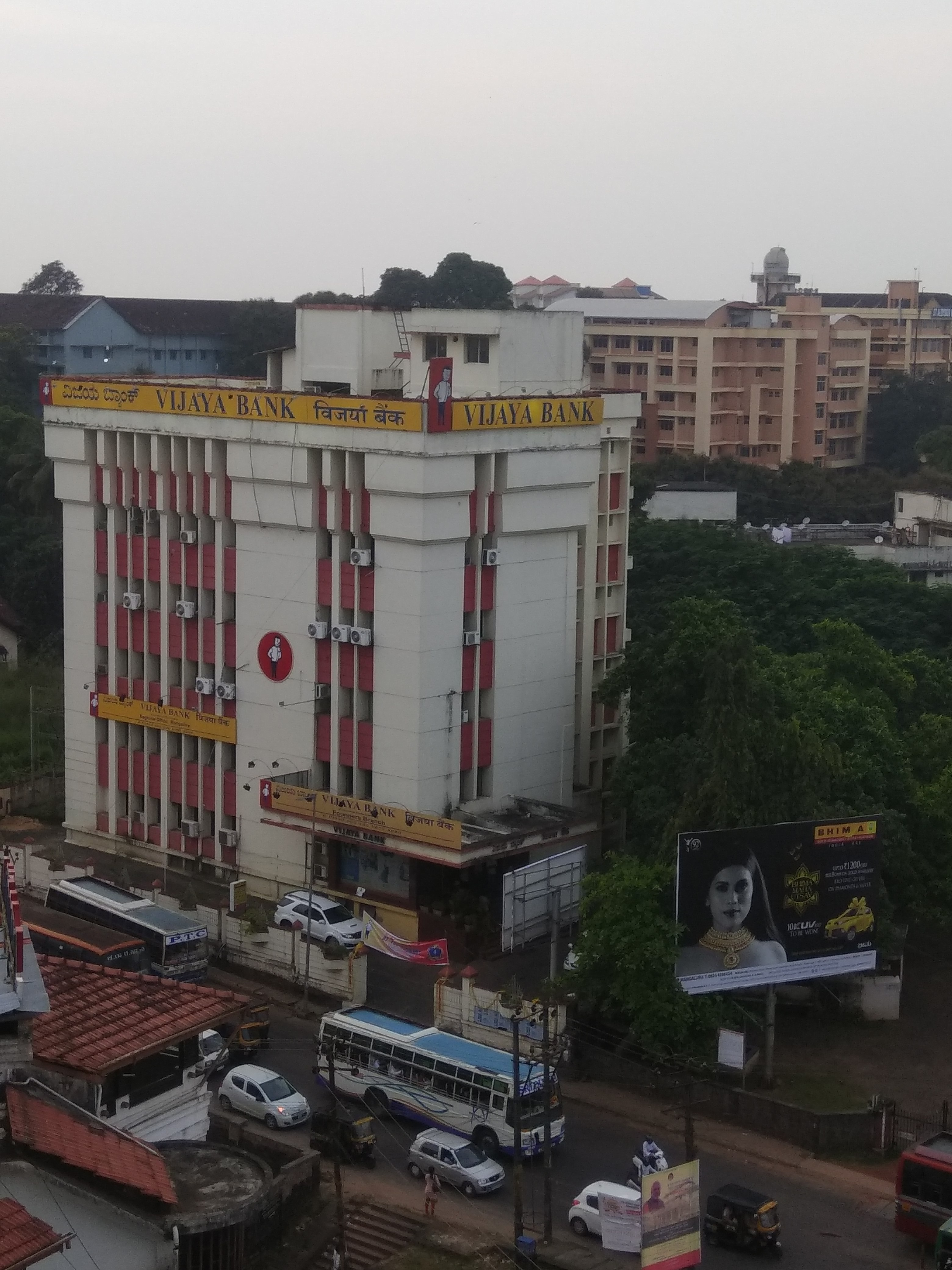 Founders Branch Bavuta Gudde , ವಿಜಯ ಬ್ಯಾಂಕ್ , ಪ್ರಾದೇಶಿಕ ಕಛೇರಿ ಮಂಗಳೂರು